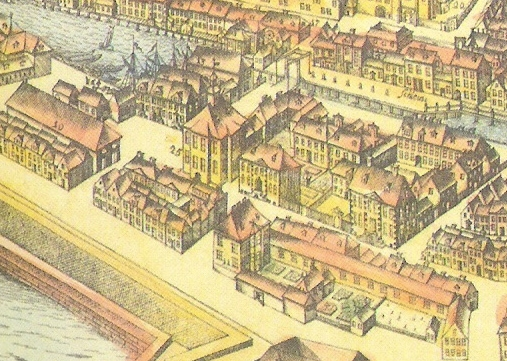 Ansicht des Friedrichswerderschen Rathauses (Nr. 25) auf dem Friedrichswerder, 1688.